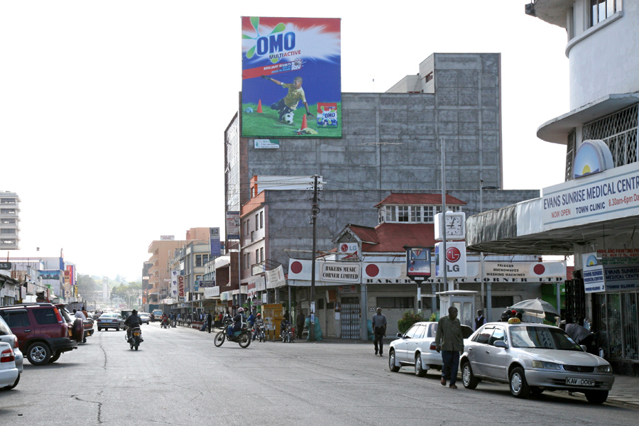 Nakuru, Kenyata Avenue